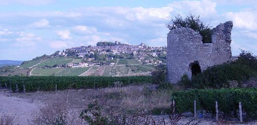 Vue de Sancerre, depuis la commune de Verdigny